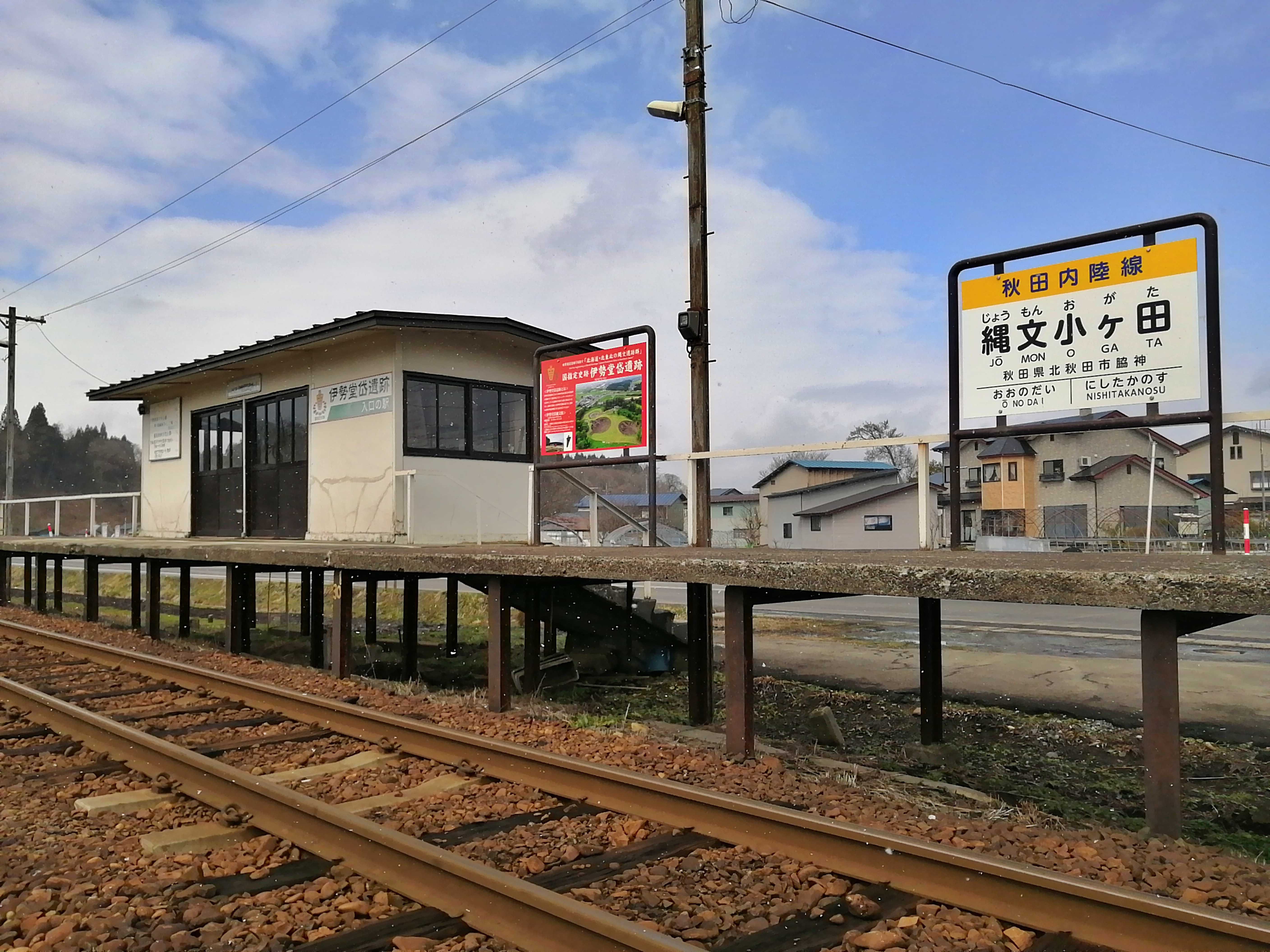 秋田内陸縦貫鉄道秋田内陸線 縄文小ヶ田駅